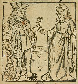 Houtsnede met Floris en Blancefloer in een uitgave van Jan van Doesborch uit ca. 1517 Bewijs ouderdom zie [1] en [2]